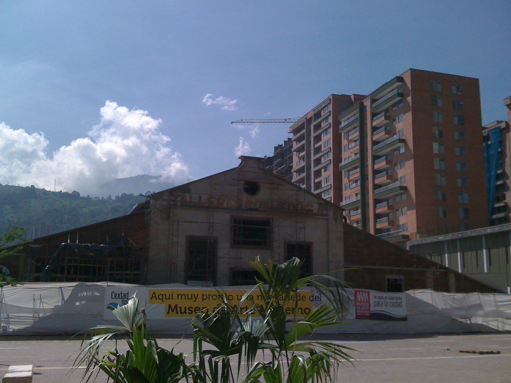 Talleres Robledo